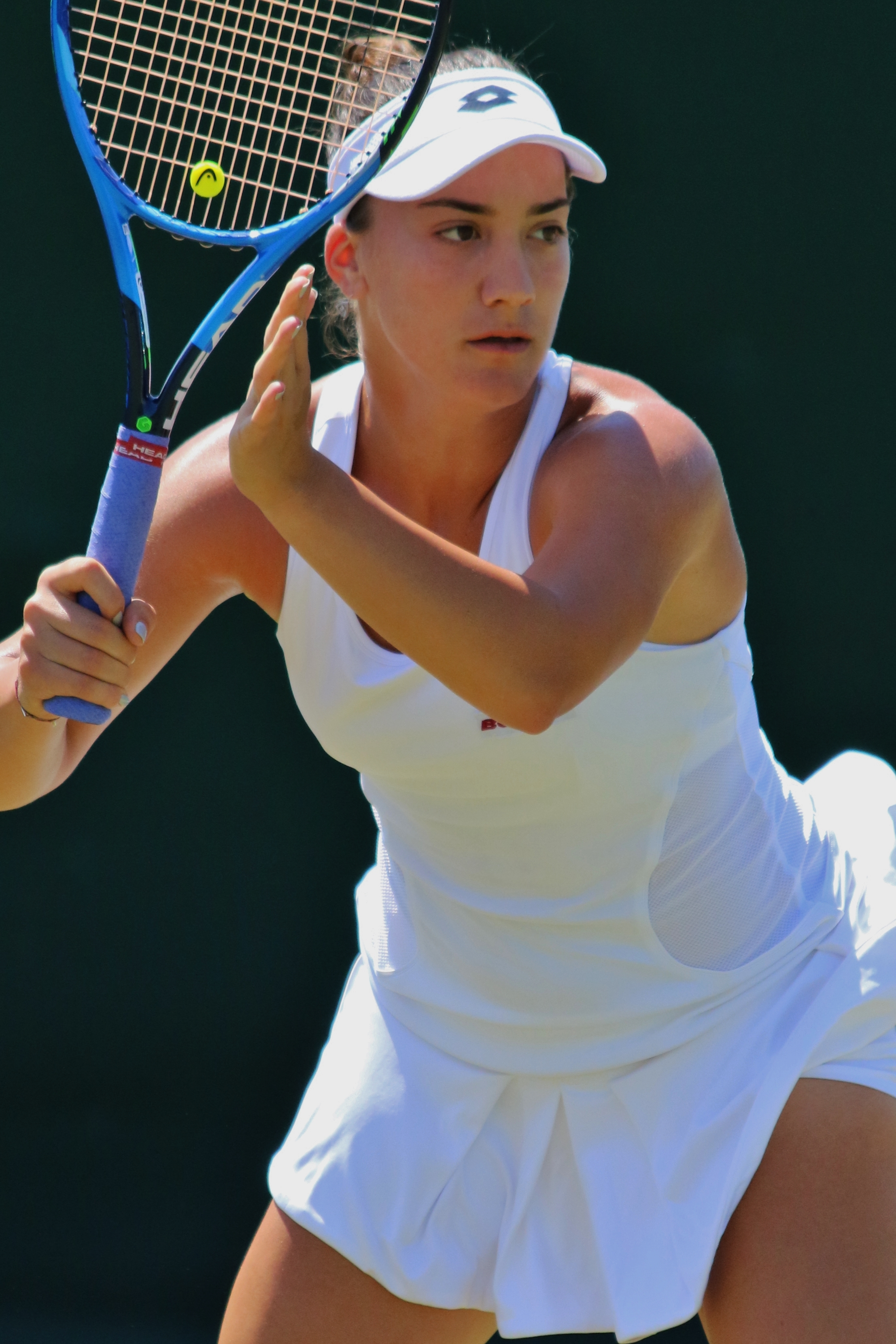 Kovinic WMQ18 (6)